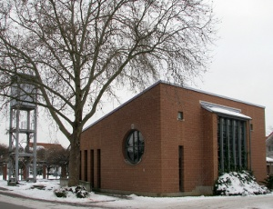 Maria-Königin-Kirche in Mannheim-Neuhermsheim